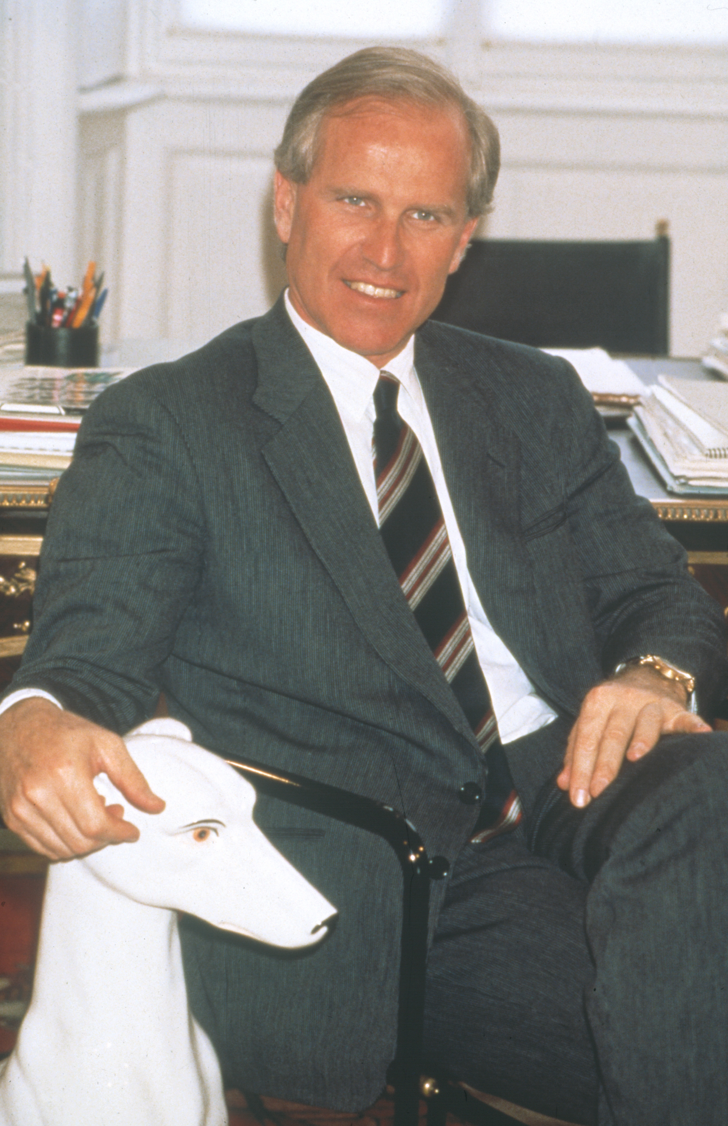 (Bergamo, 17 giugno 1942 – Milano, 13 aprile 1999)